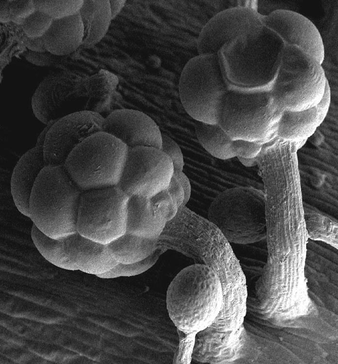 Drosera hartmeyerorum Emergenz aufgenommen mit dem Raster Elektronen Mikroskop. Foto: Regina Kettering 2002 Copyright:R. Kettering und S.Hartmeyer